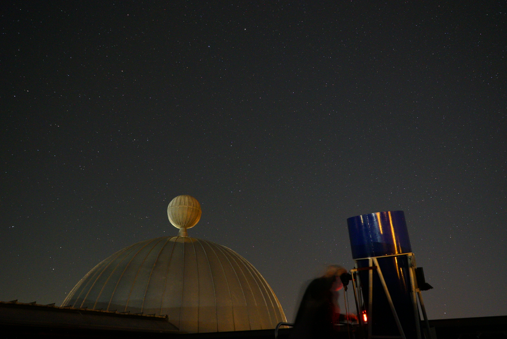 Observatory of Diedorf with 45 cm Newton telescope in front of the planetarium dome